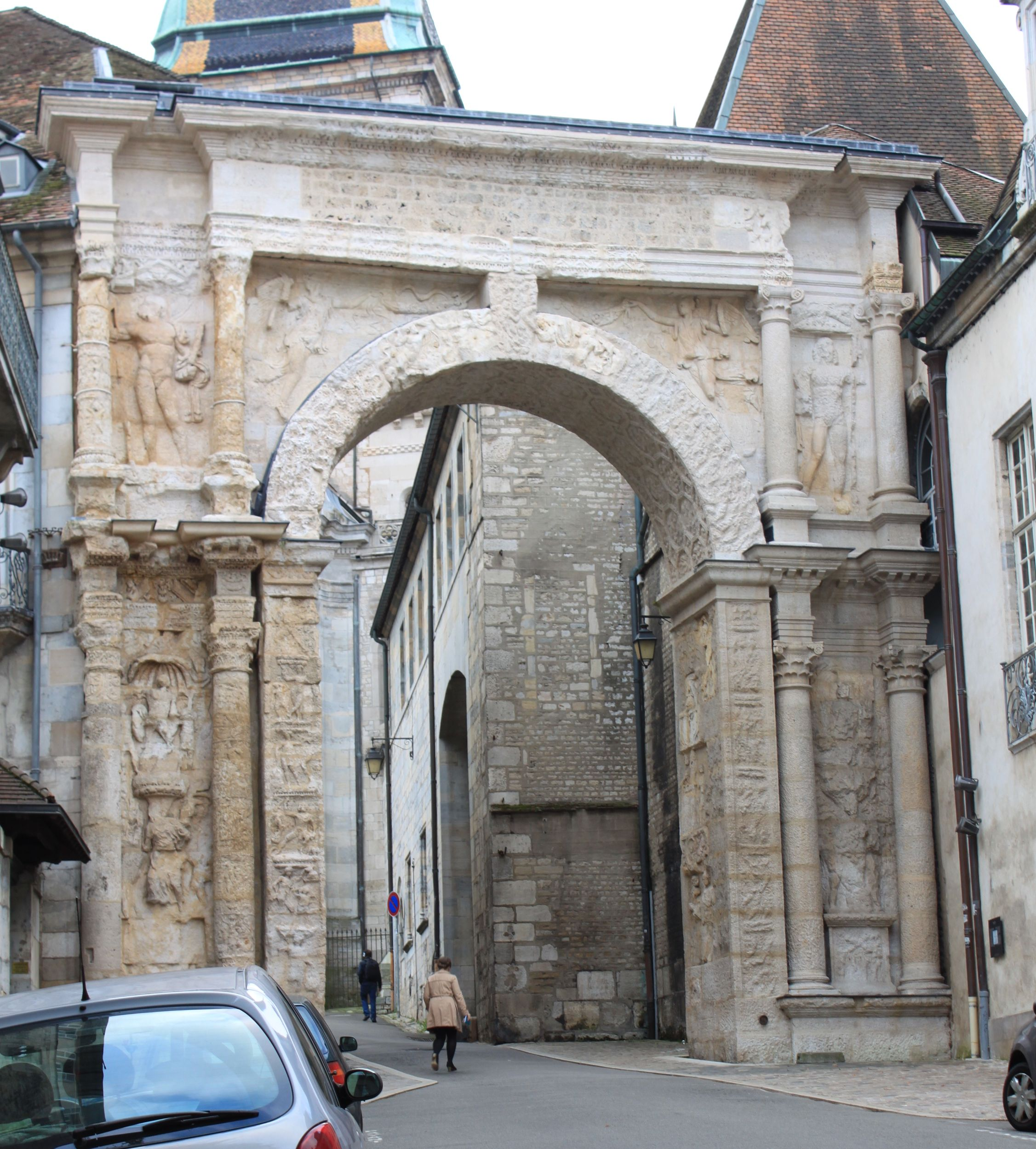 porte Noire et ruines romaines, Besançon, Franche-Comté, France